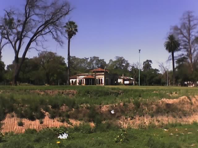 Chacra Romero o Palacio de Lago del Bosque, edificación construida hacia 1860, diseñada por Pedro Benoit.